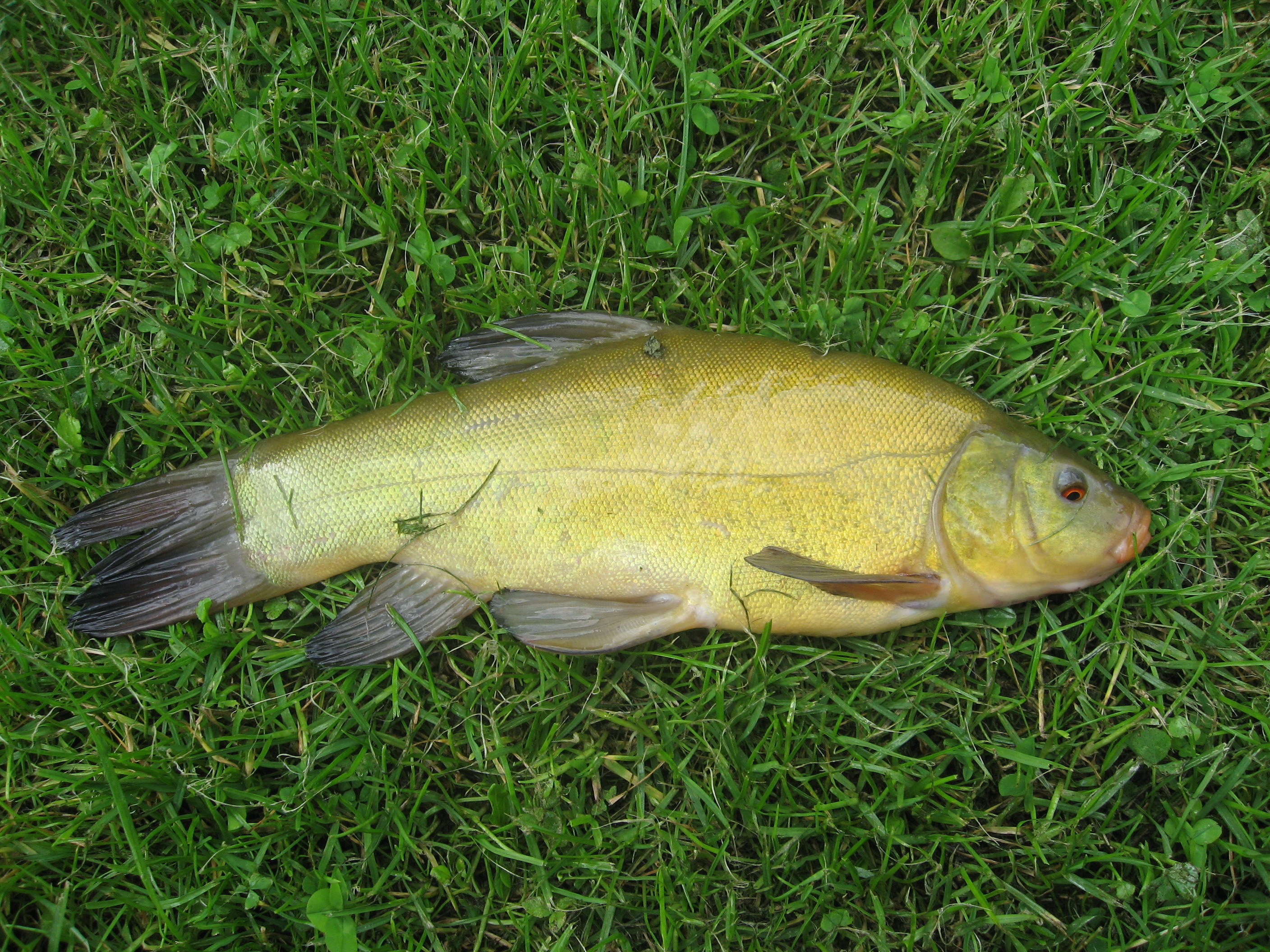 Lín obecnýLatina: Tinca tinca